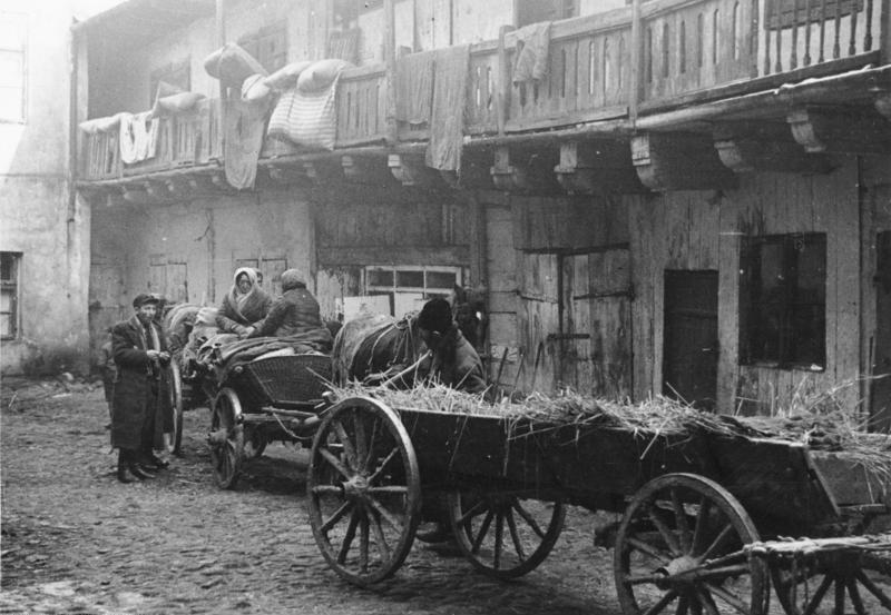 ADN-ZB II. Weltkrieg 1939-1945 Judenverfolgung durch die faschistischen deutschen Besatzungstruppen in Polen. UBz.: Ein Hof im Ghetto von Lublin.